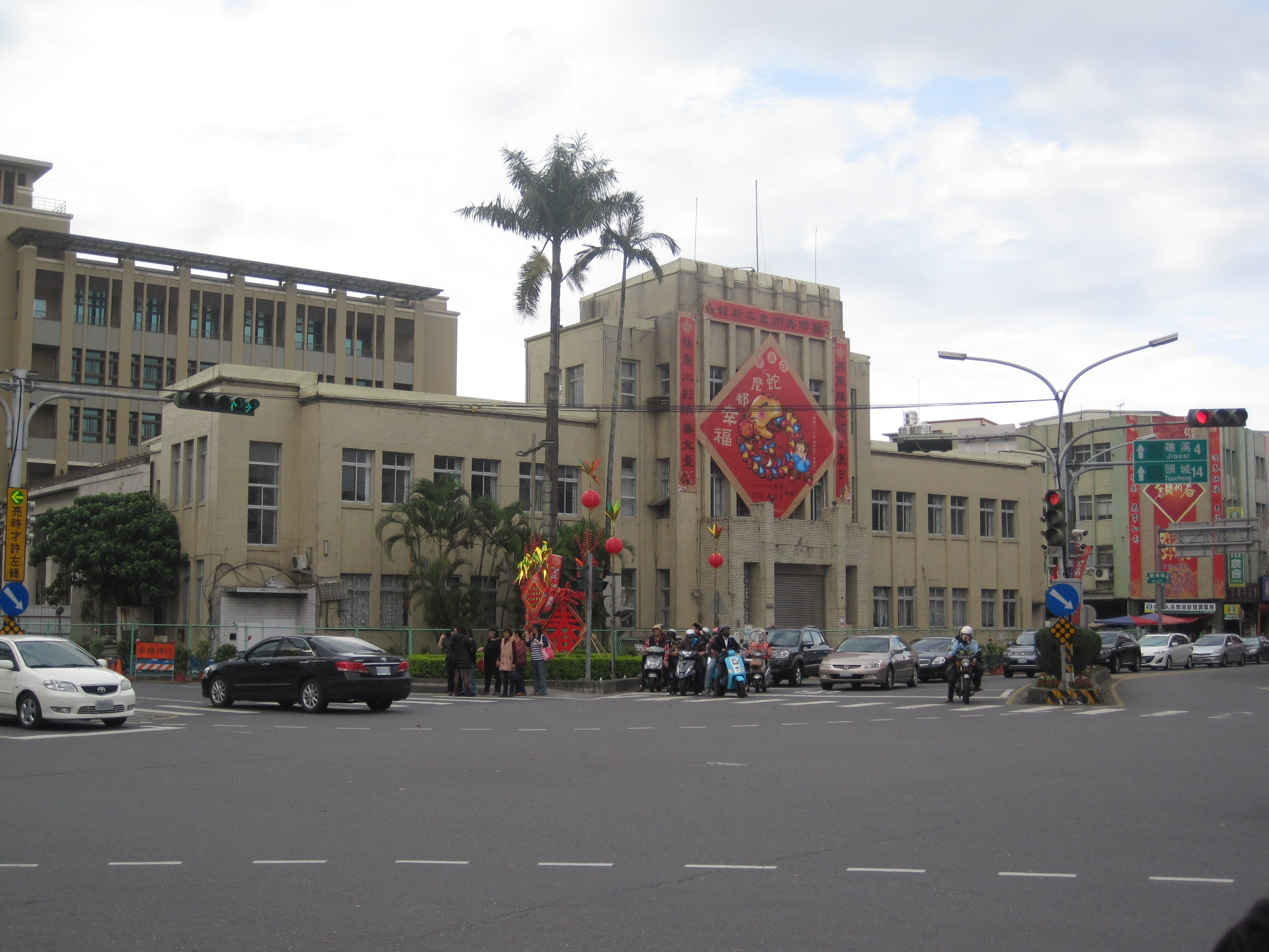 臺灣銀行宜蘭分行舊廈，地址：宜蘭縣宜蘭市中山路三段1號。